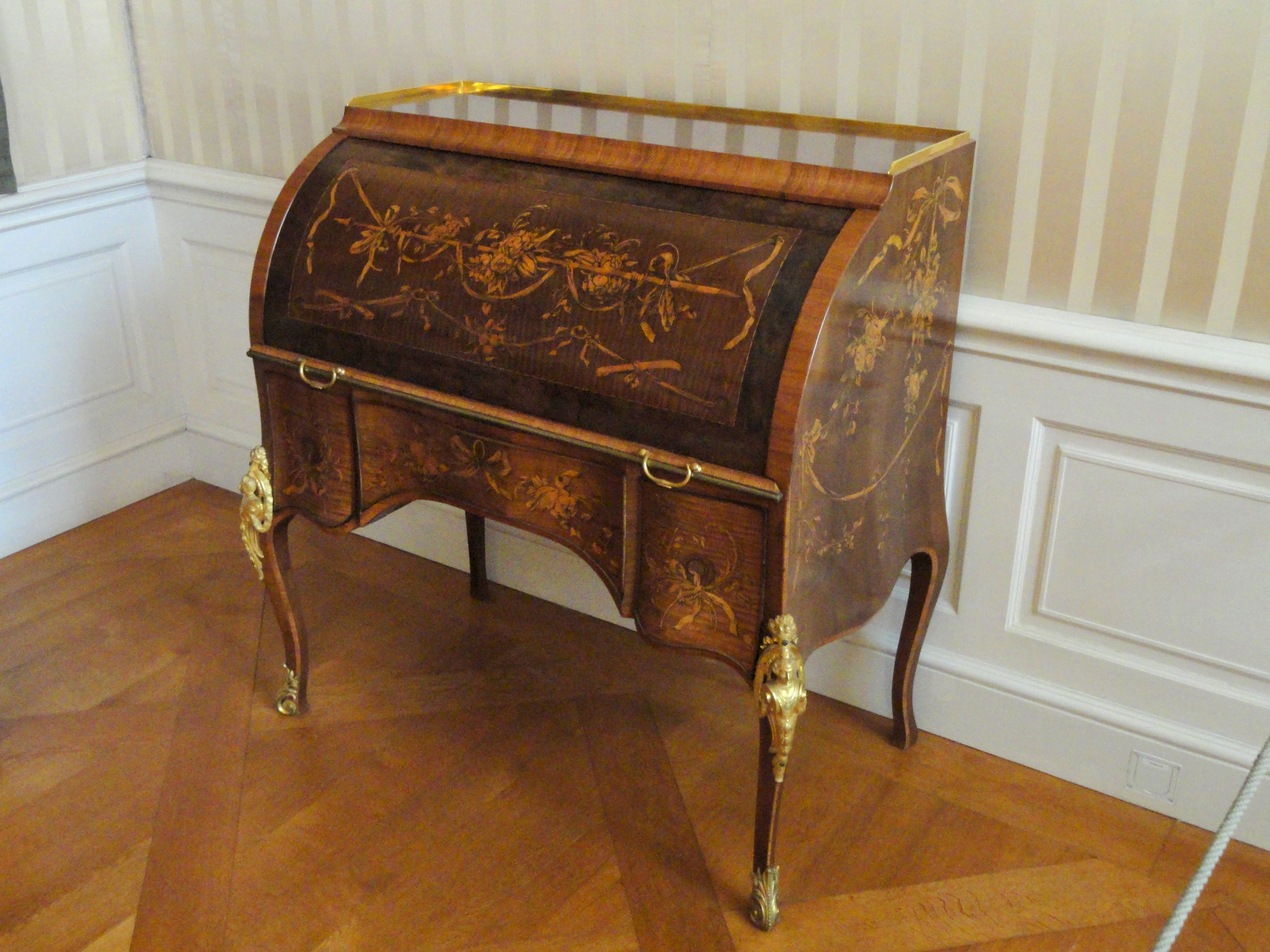 Cylinder desk by David Roentgen, 1773-1775. Furniture exhibited in the Münchner Residenz, Munich, Germany.